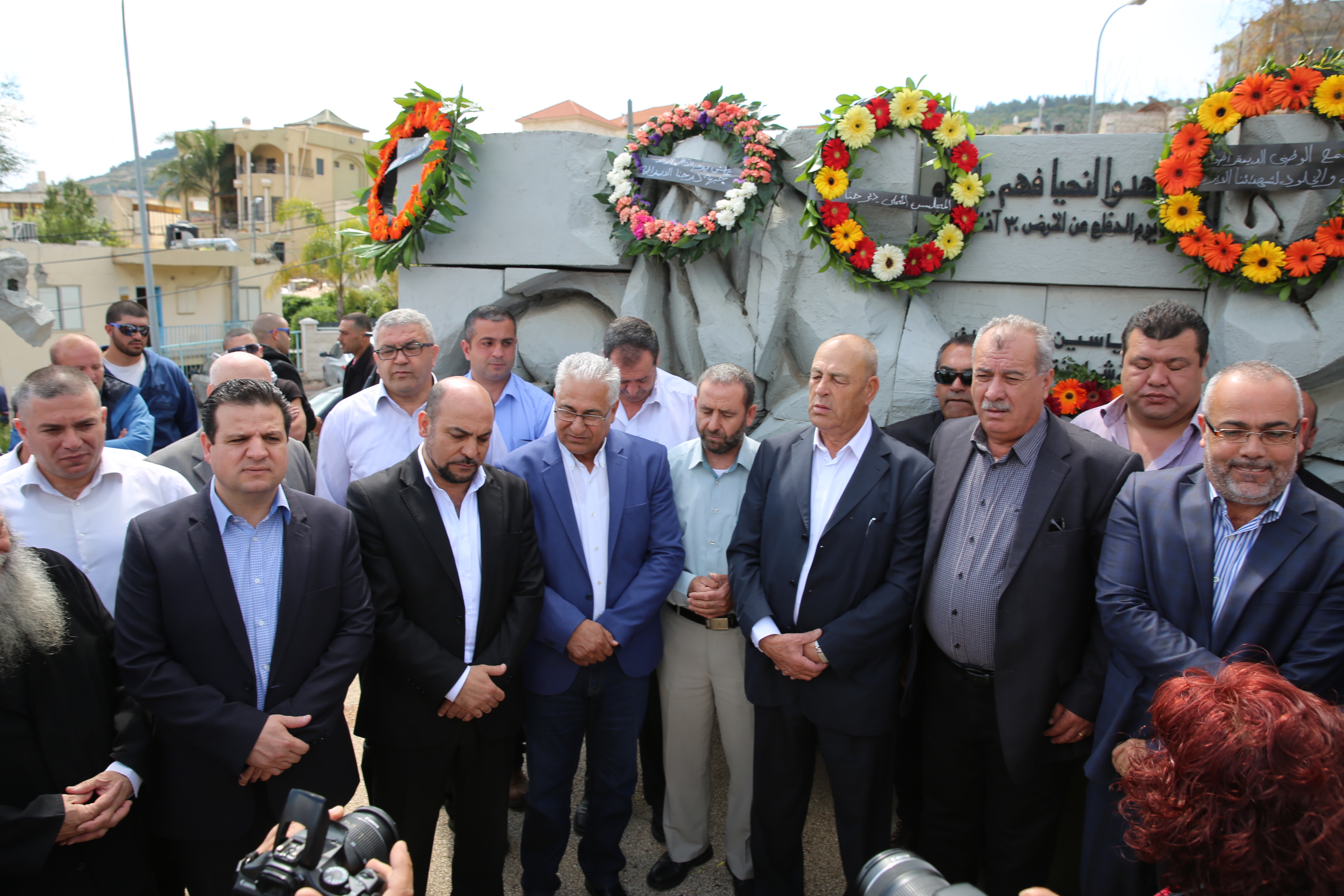 הנהגת הציבור הערבי בישראל מציינת את יום האדמה ה-40